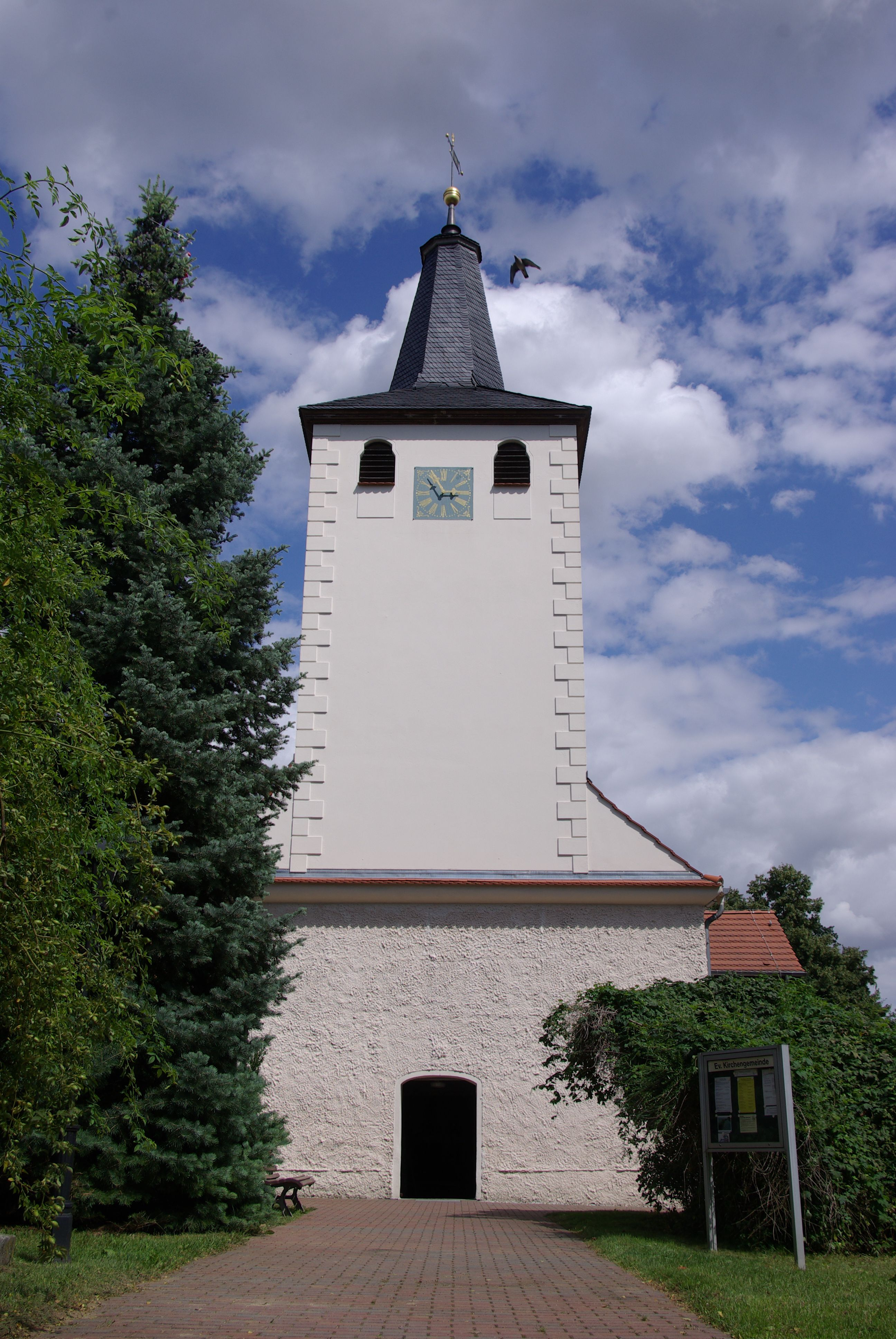 Großberren Ortsteil Diedersdorf. Die Dorfkirche stammt aus dem Anfang des 14. Jahrhunderts und steht unter Denkmalschutz.